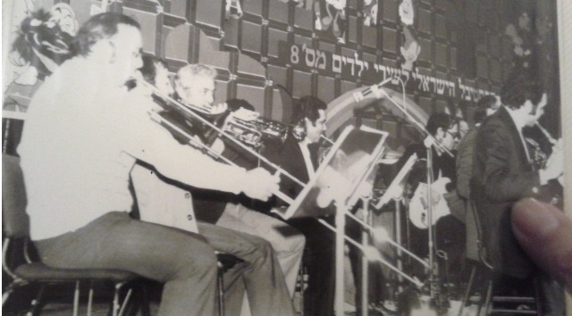 יעקב מנגן בתזמורת בפסטיבל הישראלי לשירי ילדים